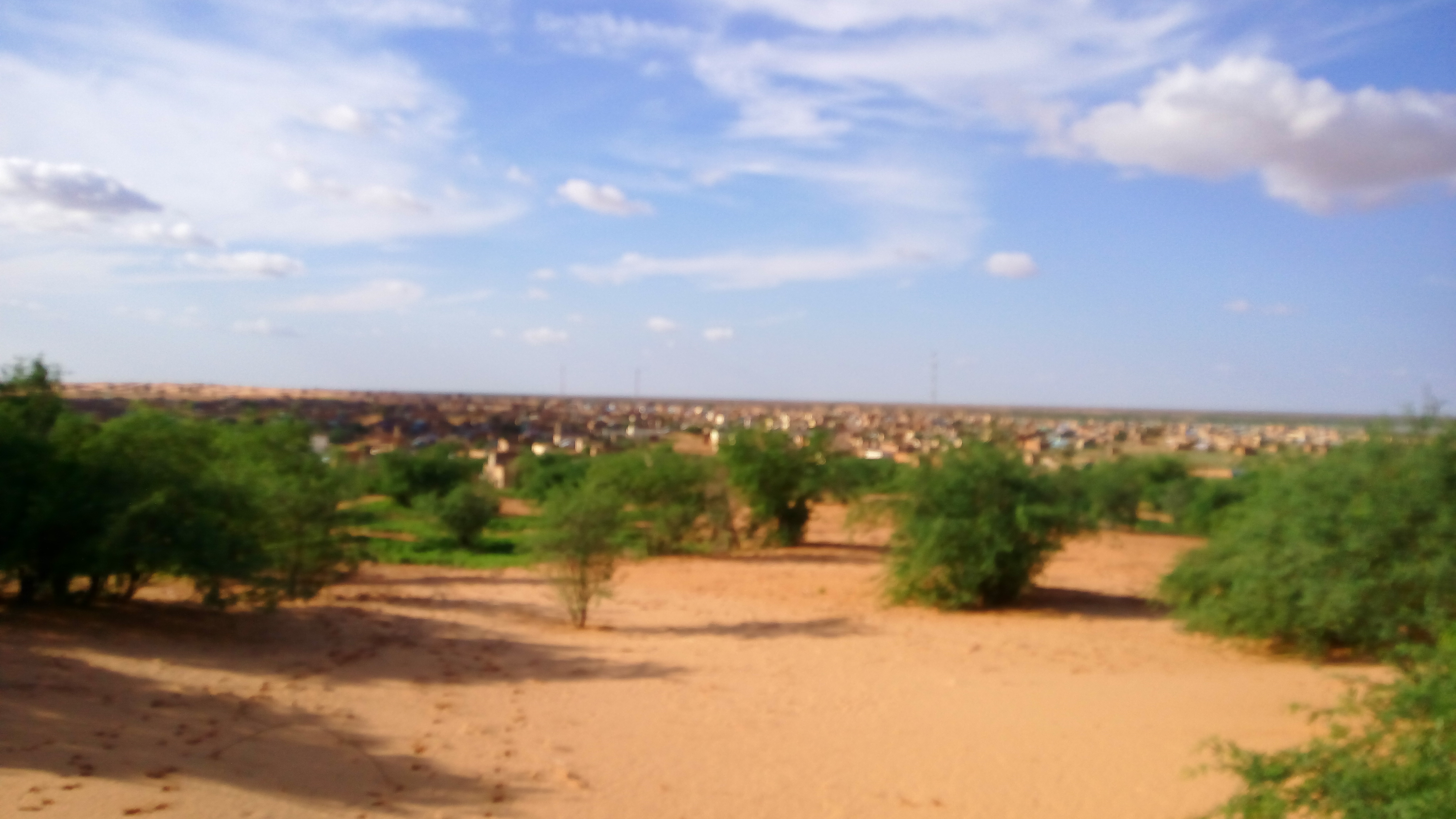 مدينة مال موريتانيا